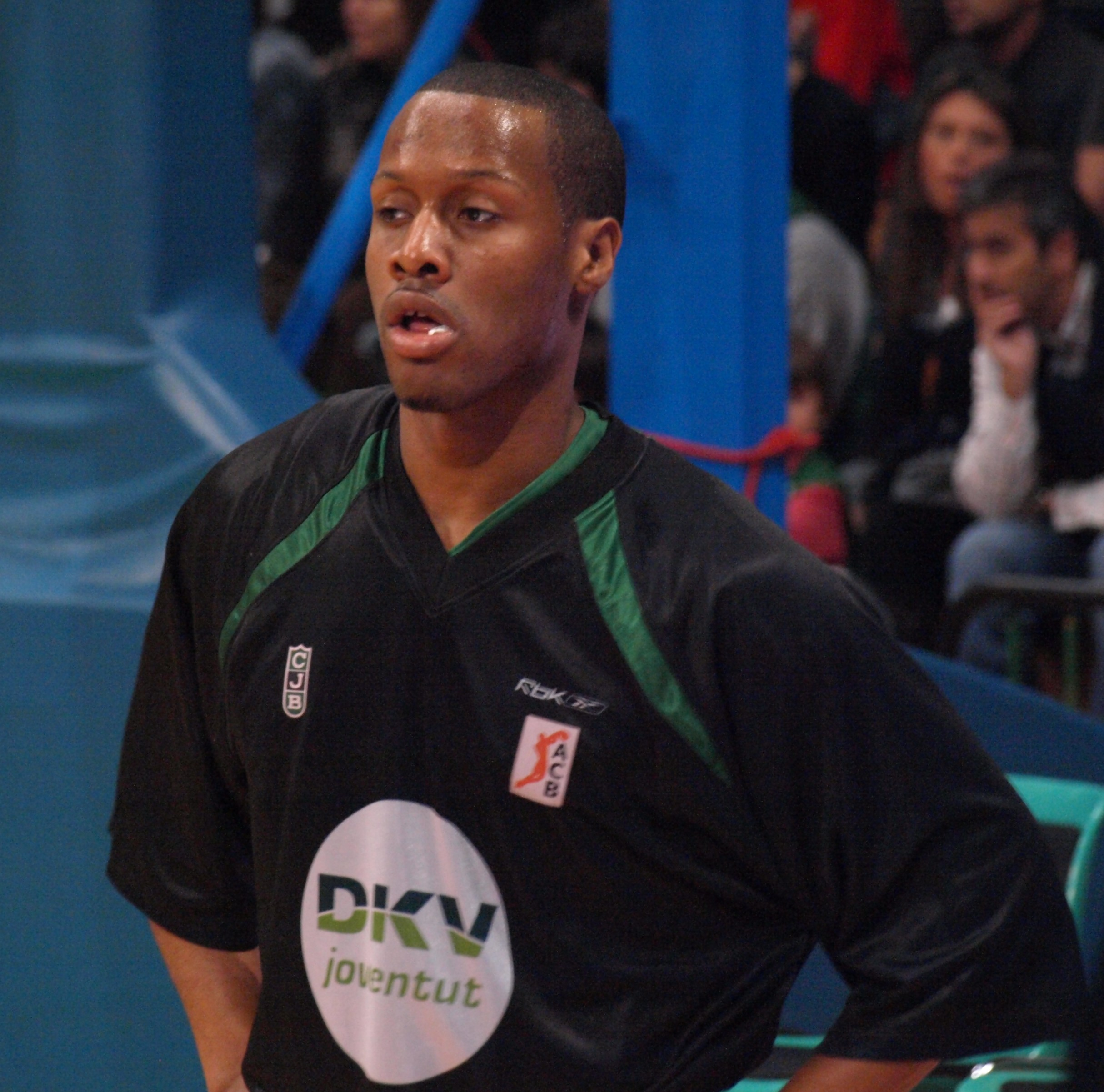 Demond Mallet en el Olímpico de Badalona.